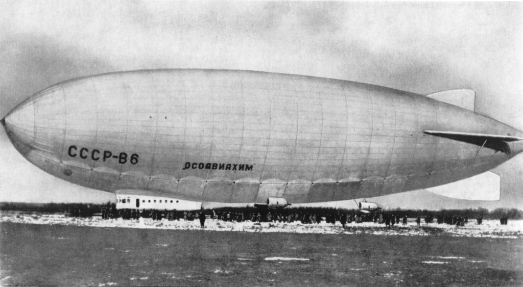 Советский дирижабль СССР В-6 (Осоавиахим)